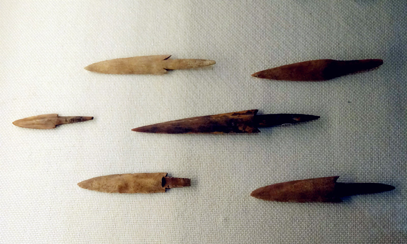 骨镞，新石器时代裴李岗文化（距今8700-6800年），河南省舞阳县贾湖遗址出土。